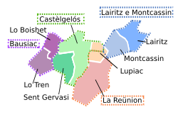 Comunas de Castèlgelós e vesiatge de la revolucion dinc a uei